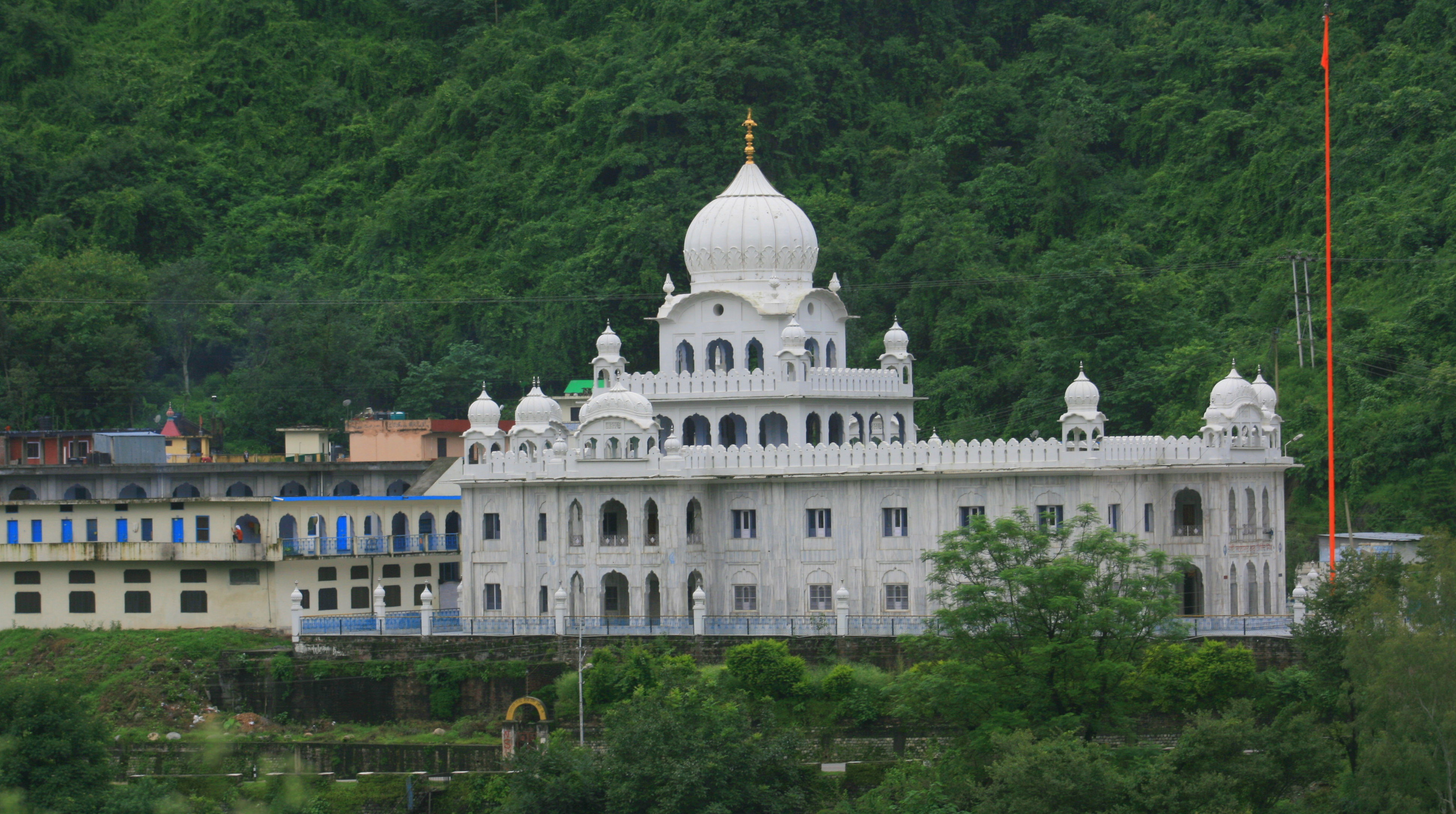 Gurudwara, Mandi NH-21